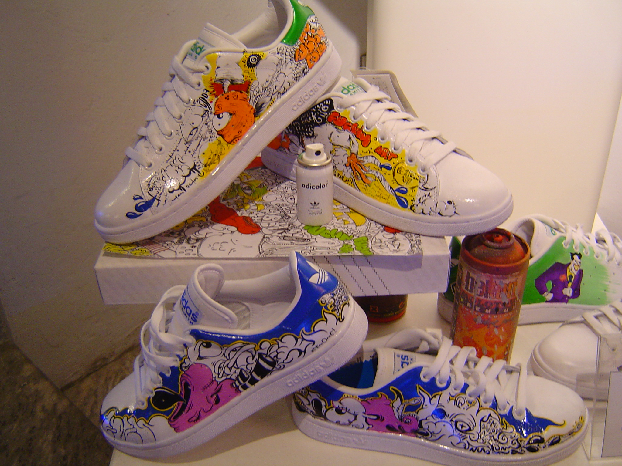 Adicolor in Adidas Shop (Corso di Porta Ticinese - Milan)